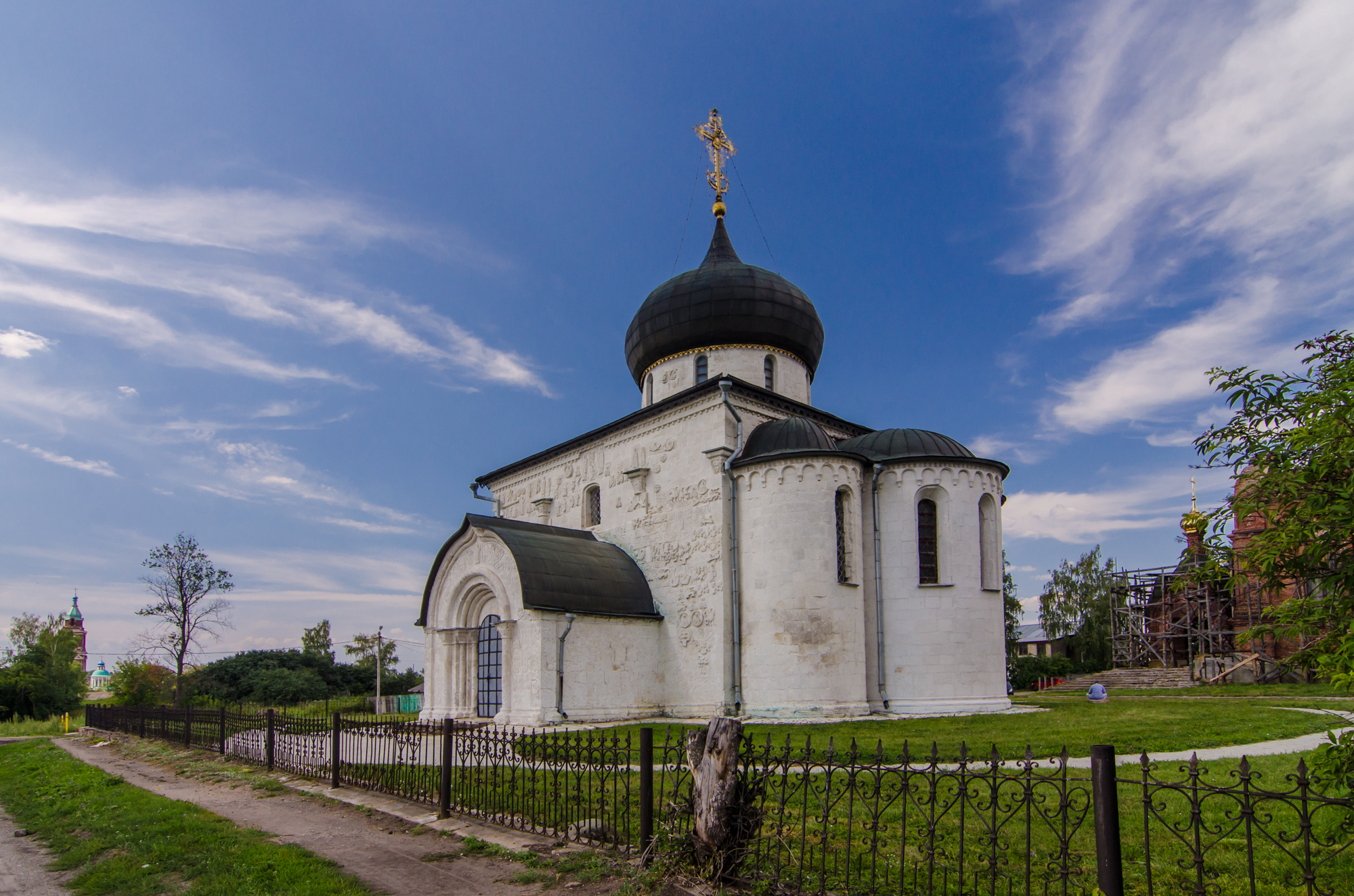 Собор Георгиевский (Георгиевский собор и земляные валы городища): улица 1 Мая, Юрьев-Польский, Юрьев-Польский район, Владимирская область